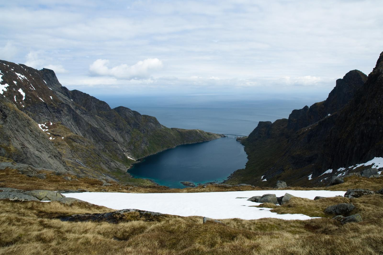 Djupfjorden in Moskenes, Lofoten, Norway